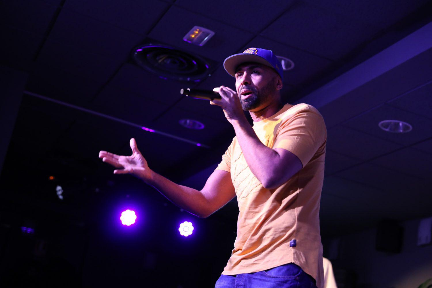 Un jurado compuesto por los poetas Ajo, Peru Saizperez y Ángela Segovia ha sido el encargado de elegir a los ganadores del premio de poesía para jóvenes León Felipe, convocado por el Ayuntamiento en homenaje al poeta en el 50 aniversario su muerte. Este premio se enmarca en las actividades de fomento de la lectura en Madrid y busca acercar la poesía a los jóvenes a través del reconocimiento de la figura literaria de León Felipe. Este concurso ha tomado el relevo al de poesía para niñas y niños que fue convocado el pasado año en torno a la figura de Gloria Fuertes.